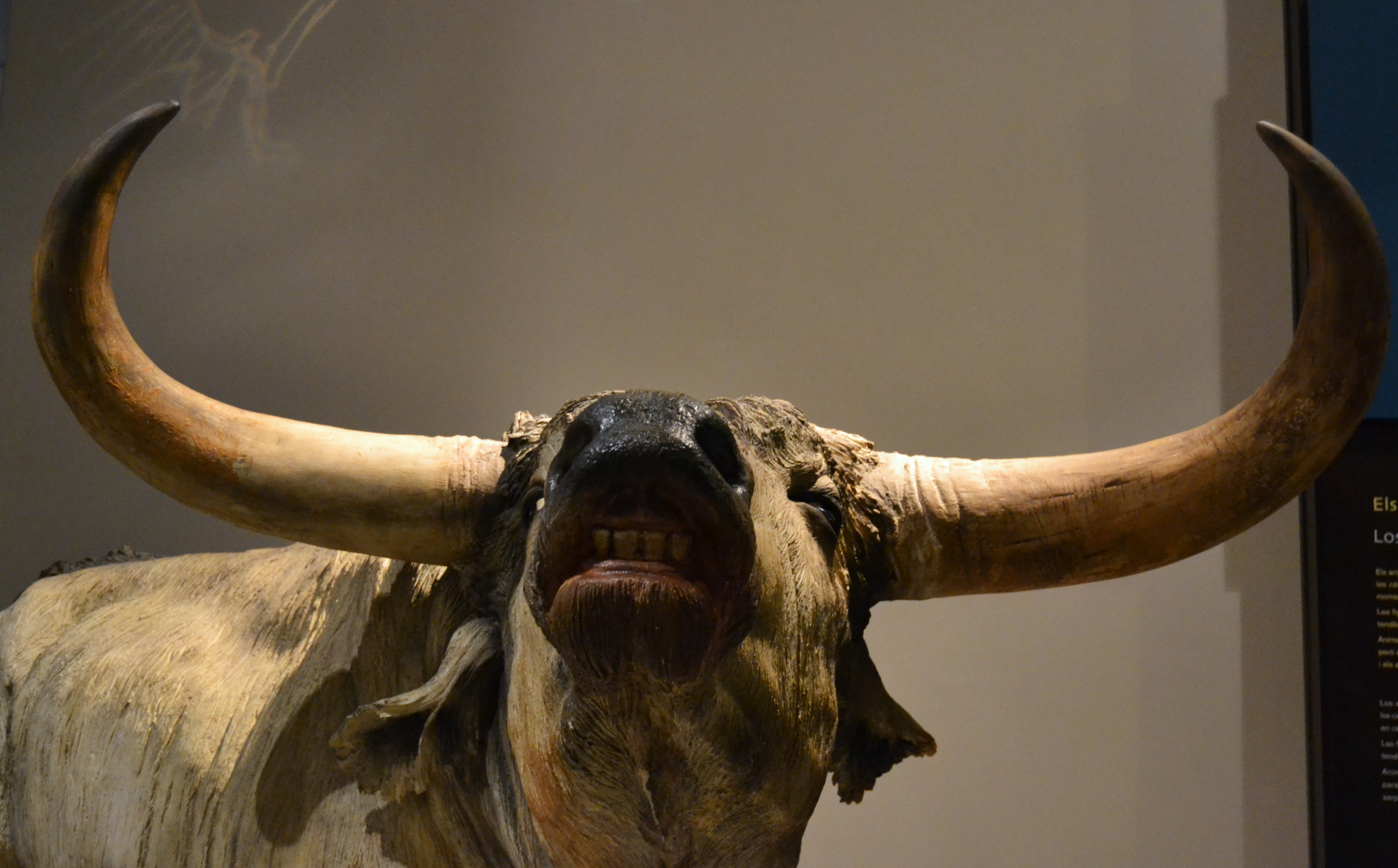 Reproducció d'un ur al museu de la Valltorta, cap.